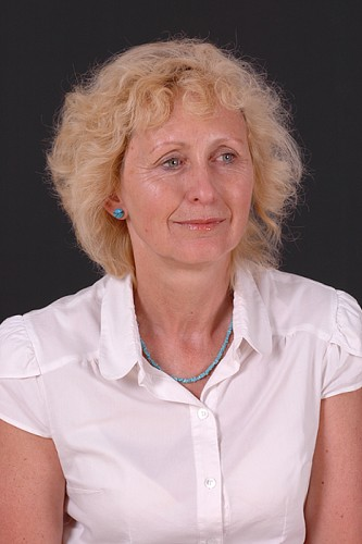 Ředitelka Gymnázia v Kadani 1996 - 2011